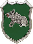 Pucelle de la troisième escadrille de l'Escadron de Chasse 3/3 "Ardennes"